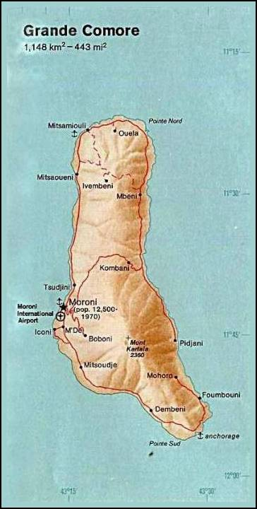 aus "The following maps were produced by the U.S. Central Intelligence Agency, unless otherwise indicated."